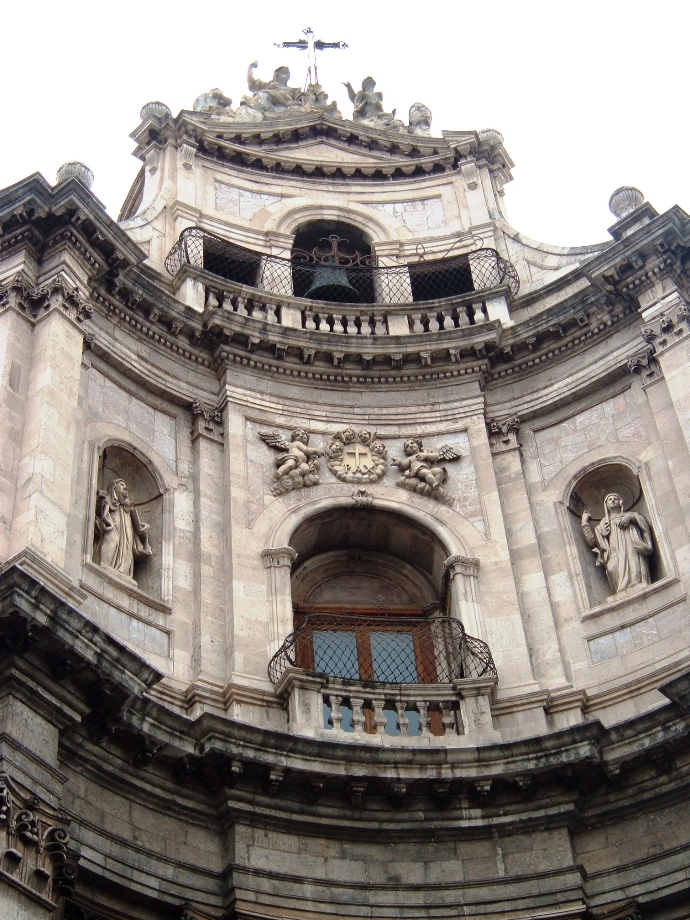 Facciata della chiesa dell'ex convento benedettino di San Placido a Catania, progettata da Stefano Ittar (1769).